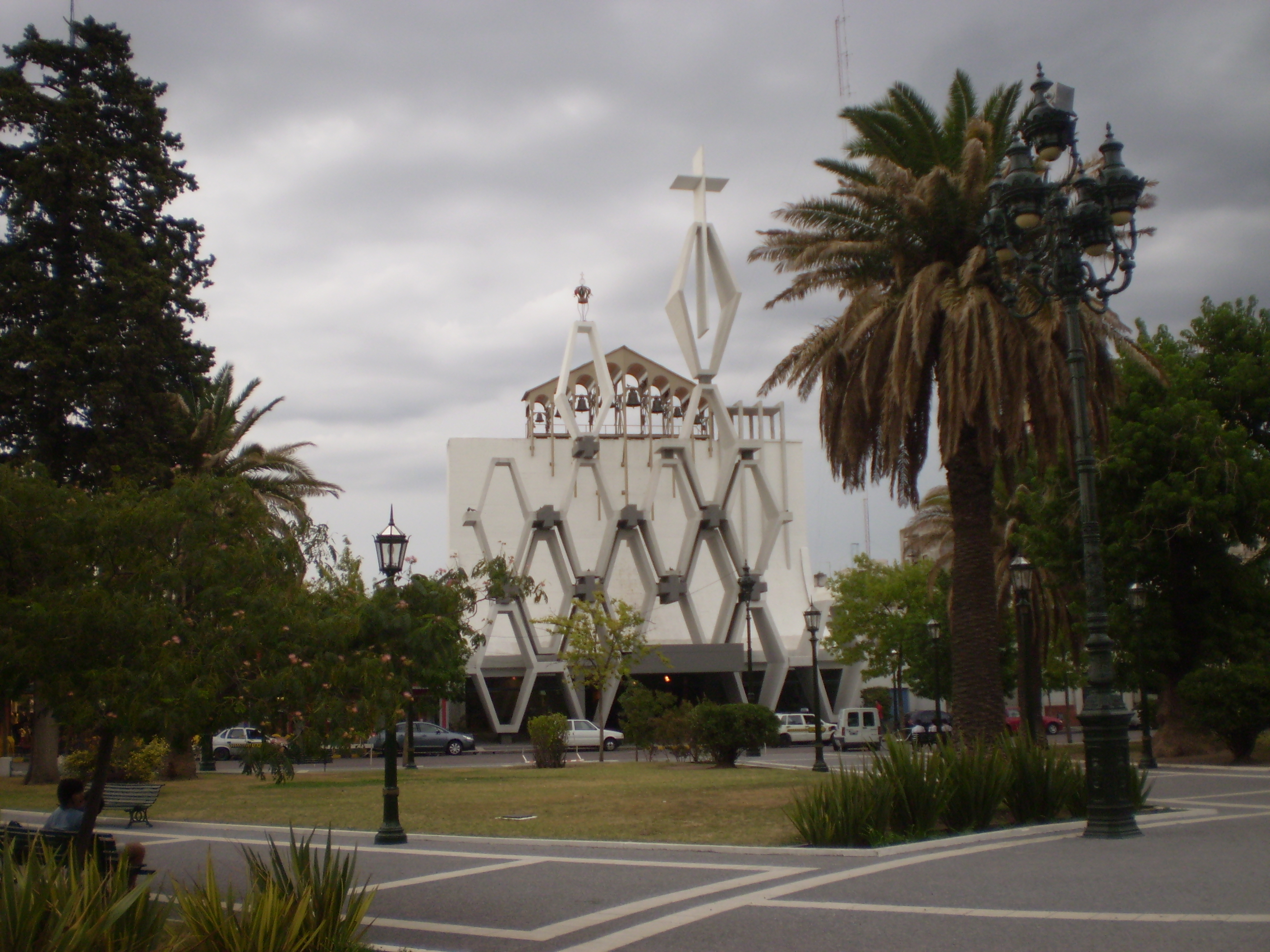 Santa Rosa Cathedral — main church. Santa Rosa, La Pampa province, Argentina.